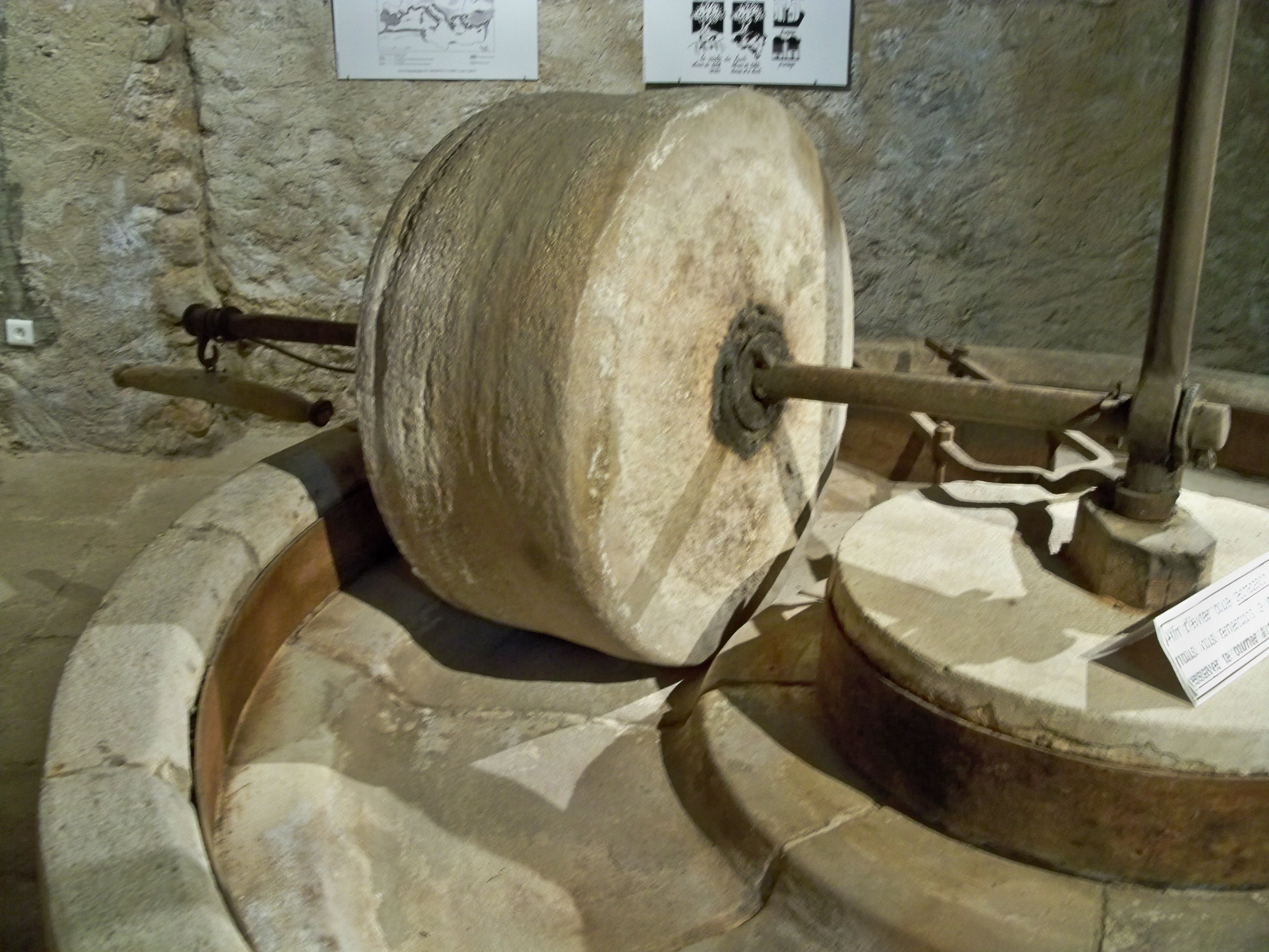 meules à olives